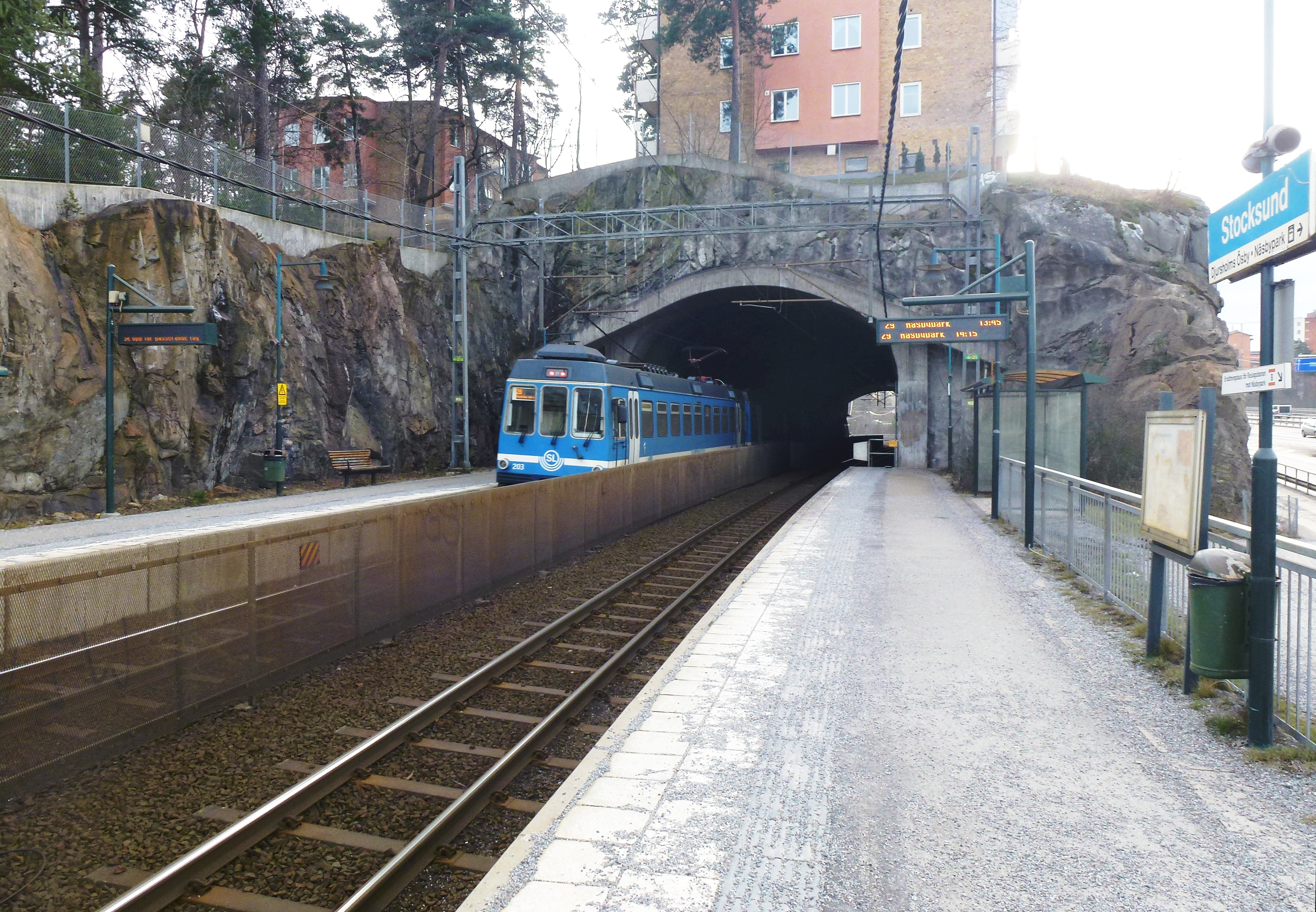 Stocksunds station och Sikrenotunneln